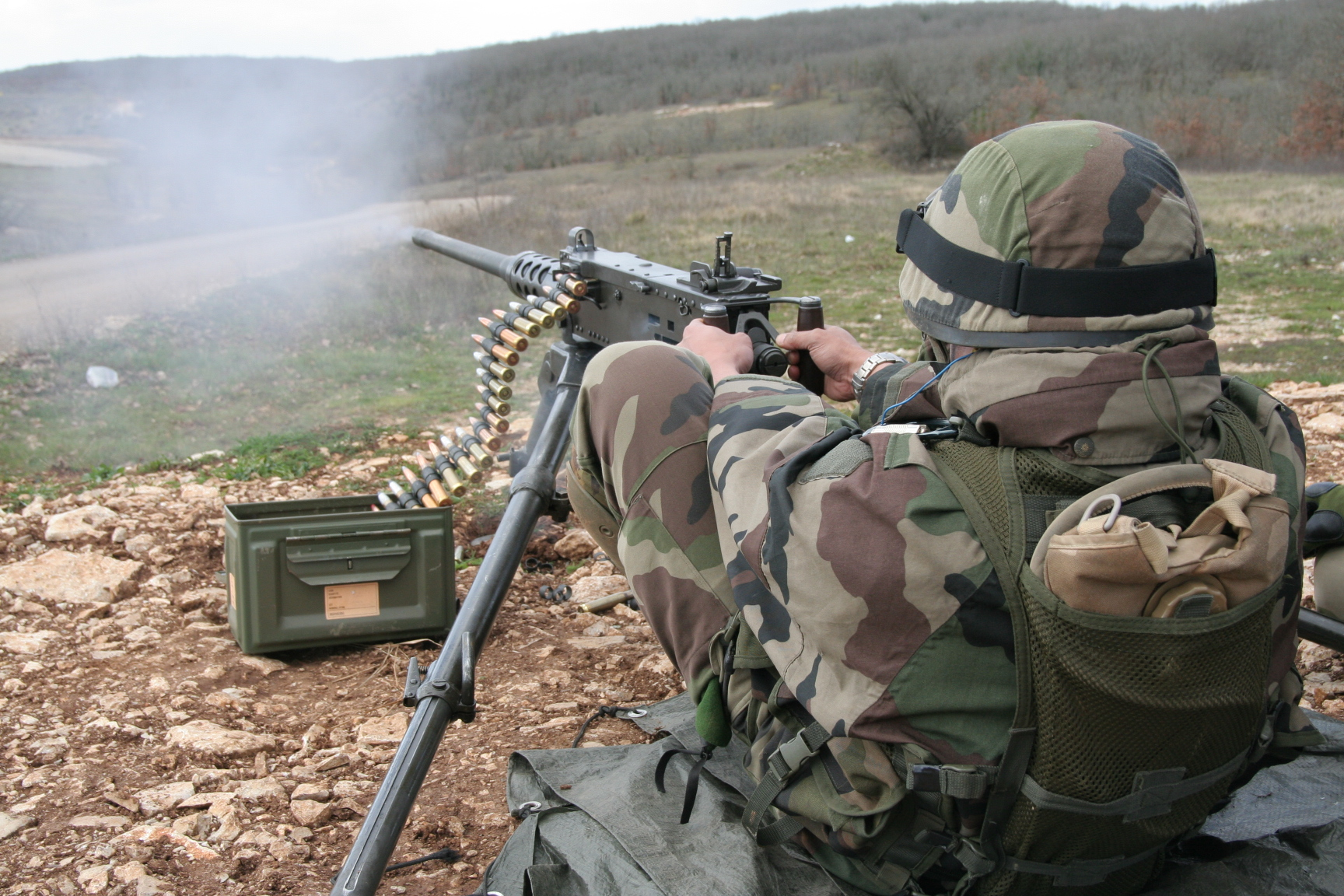 Mitrailleuse Browning calibre .50 (12,7 mm) du 2e Régiment étranger d'infanterie à l'exercice